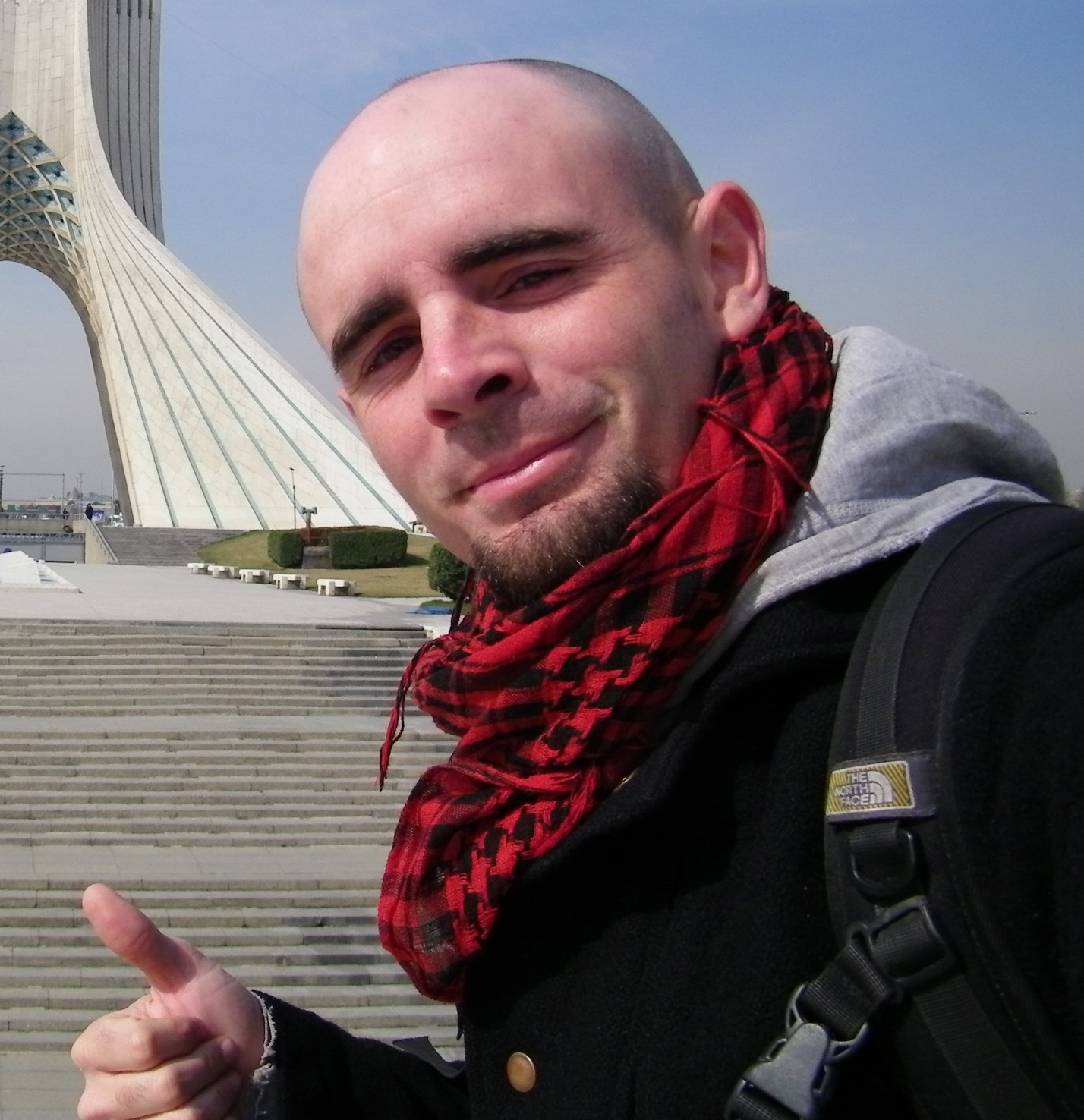 Jérémy Marie à Téhéran, Iran